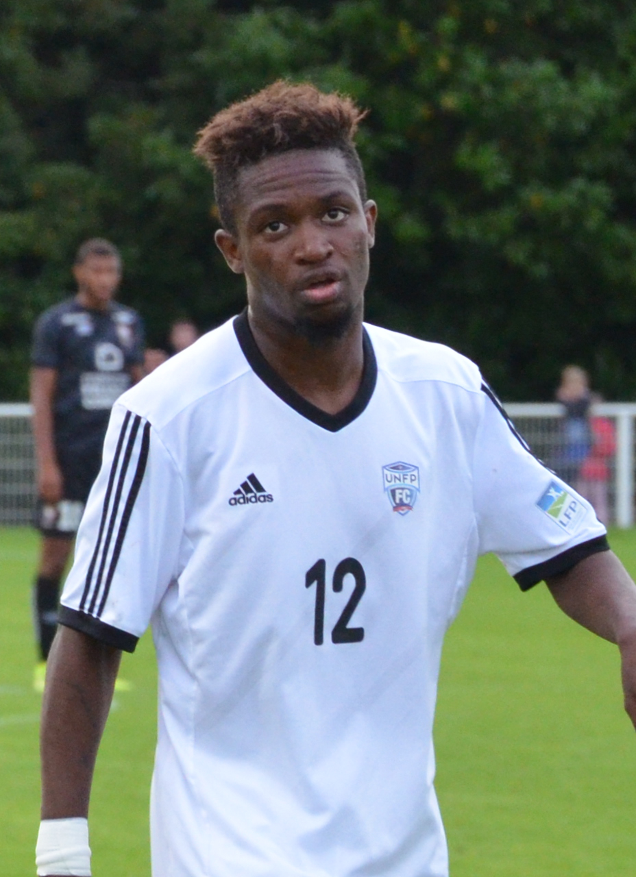 Photographie prise lors du match opposant le SM Caen à l'UNFP en match amical au stade Louis-Villemer de Saint-Lô le 30 juillet 2016. Ici, Gérald Kilota.